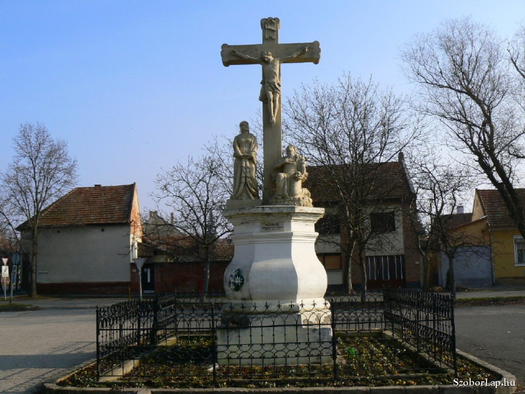 A feszületet 1817-ben Vadkerti József, a Szeged, alsóvárosi ispotály felügyelő gondnoka állította. A barokk építészeti elemekből álló talapzat nyolcszögletű. A műemlék szoborcsoport életnagyságú figurái mészkő-homokkőből készültek. Szakszerű restaurálását Bánvölgyi László (Szeged) szobrászművész, restaurátor végezte. A talapzat újravakolását, szigetelését, festését Papp Vilmos (Szeged) vállalkozó készítette.(2002)